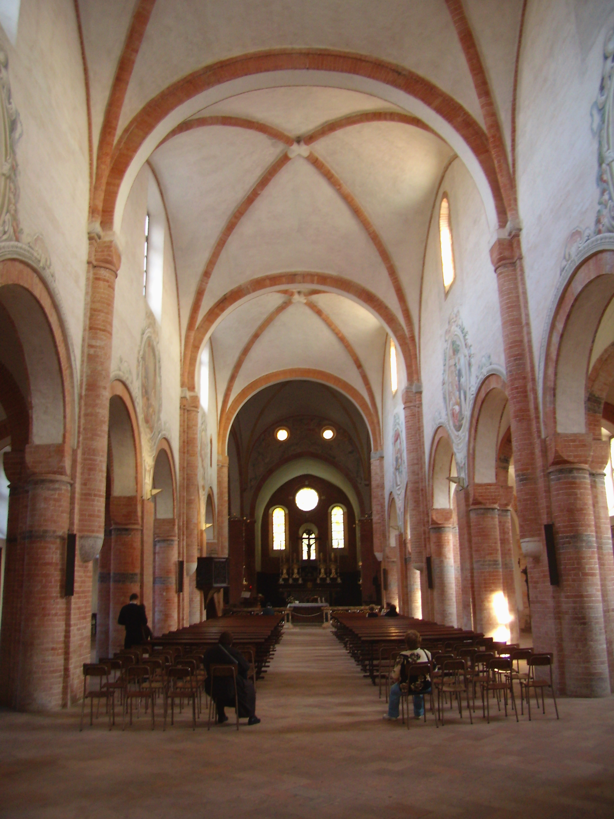 Interno della chiesa parrocchiale dell'Assunzione della Beata Vergine Maria ad Abbadia Cerreto.